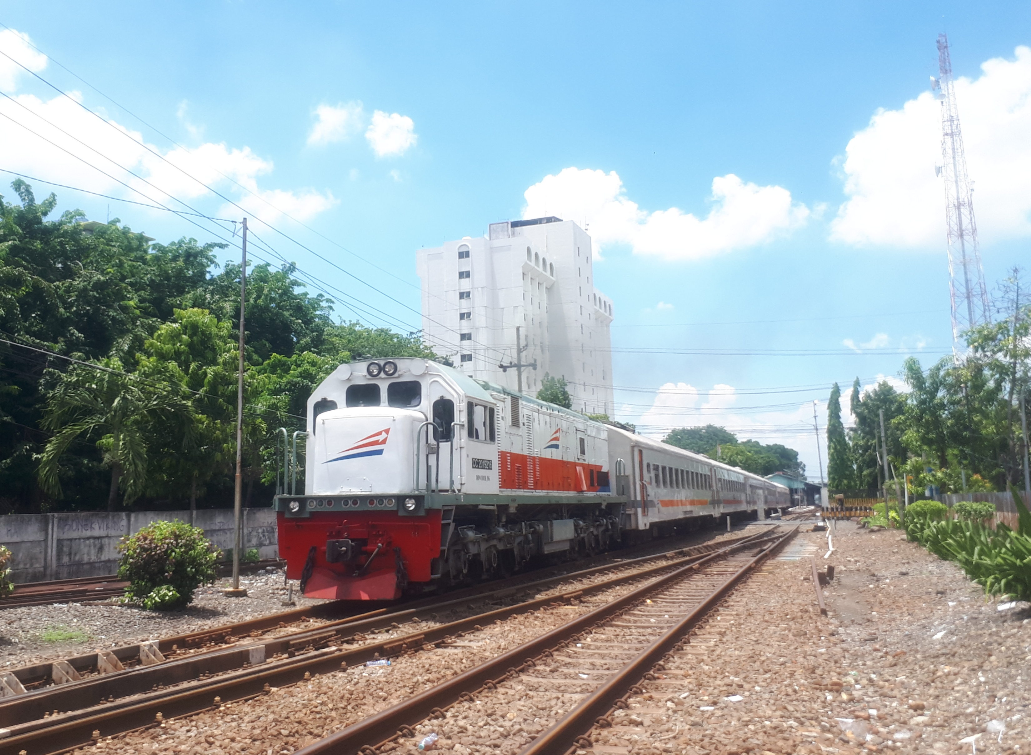 Kereta api Dhoho saat meninggalkan Stasiun Surabaya Gubeng